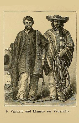 b. Vaquero und Llanero aus Venezuela.